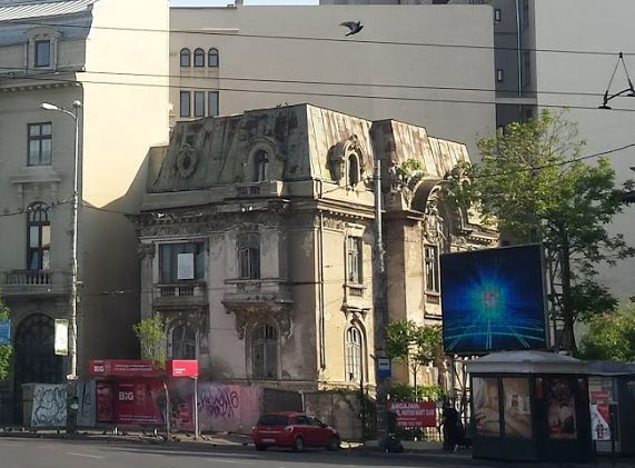 Casa Nanu-Muscel situată în Piața Romană, București.